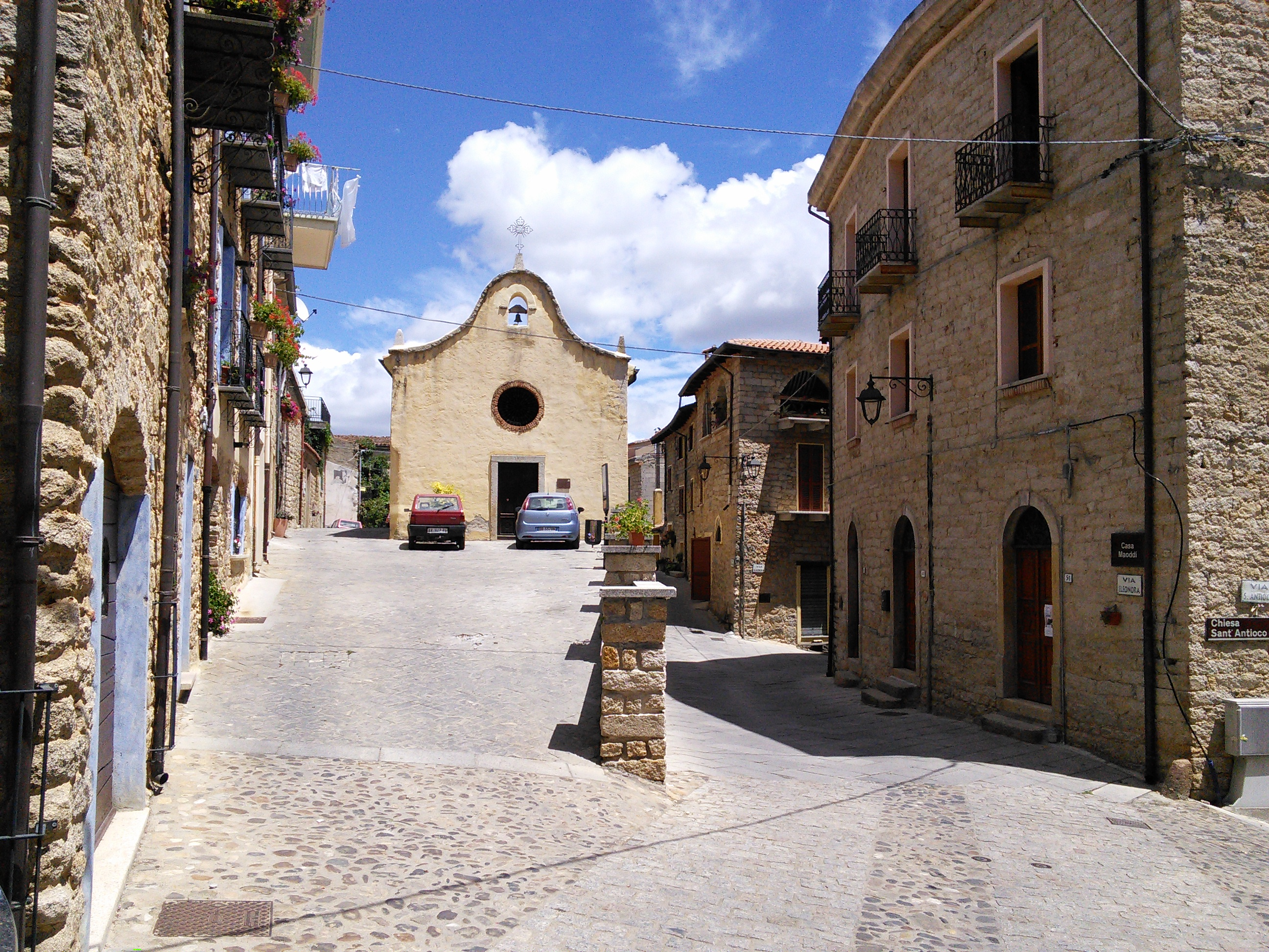 Stadtbild von Gavoi, Nuoro, Italien, Juli 2014 Chiesa del Carmelo / Karmelkirche